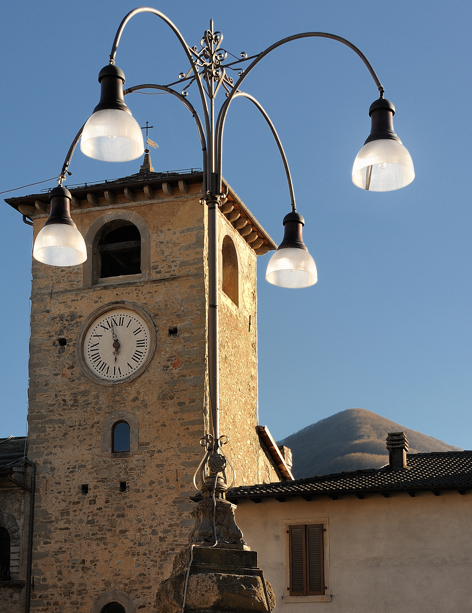 Torre dell'Orologio - MIBAC This is a photo of a monument which is part of cultural heritage of Italy.